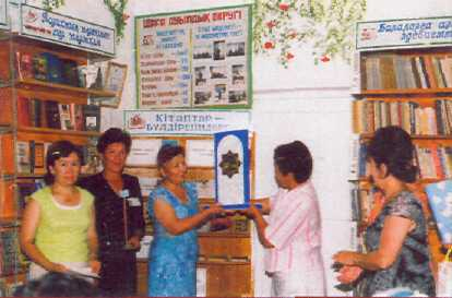 Отырар орталықтандырылған кітапханалар жүйесі